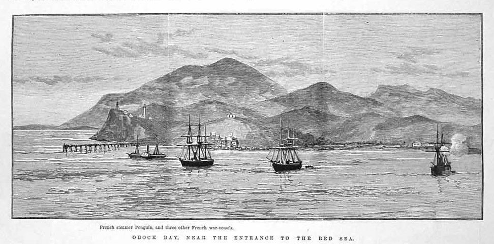 Illustration accompagnant un bref article de l'Illustrated London News du 15 juin 1889 sur L'Affaire de Sagallo, c'est-à-dire la confrontation survenue en février la même année entre un groupe de colons russes dirigé par le cosaque Achinoff et une escadre française à Sagallo dans le golfe de Tadjoura. L'escadre était composée des quatre vaisseaux représentés sur la gravure: le Seignelay, le Primauguet, le Météore et le Pingouin (identifié comme le "Penguin" sur la gravure) et à bord duquel Achinoff était retenu prisonnier au moment du passage du correspondant du journal. La côte d'Obock est présentée de façon très fantaisiste.